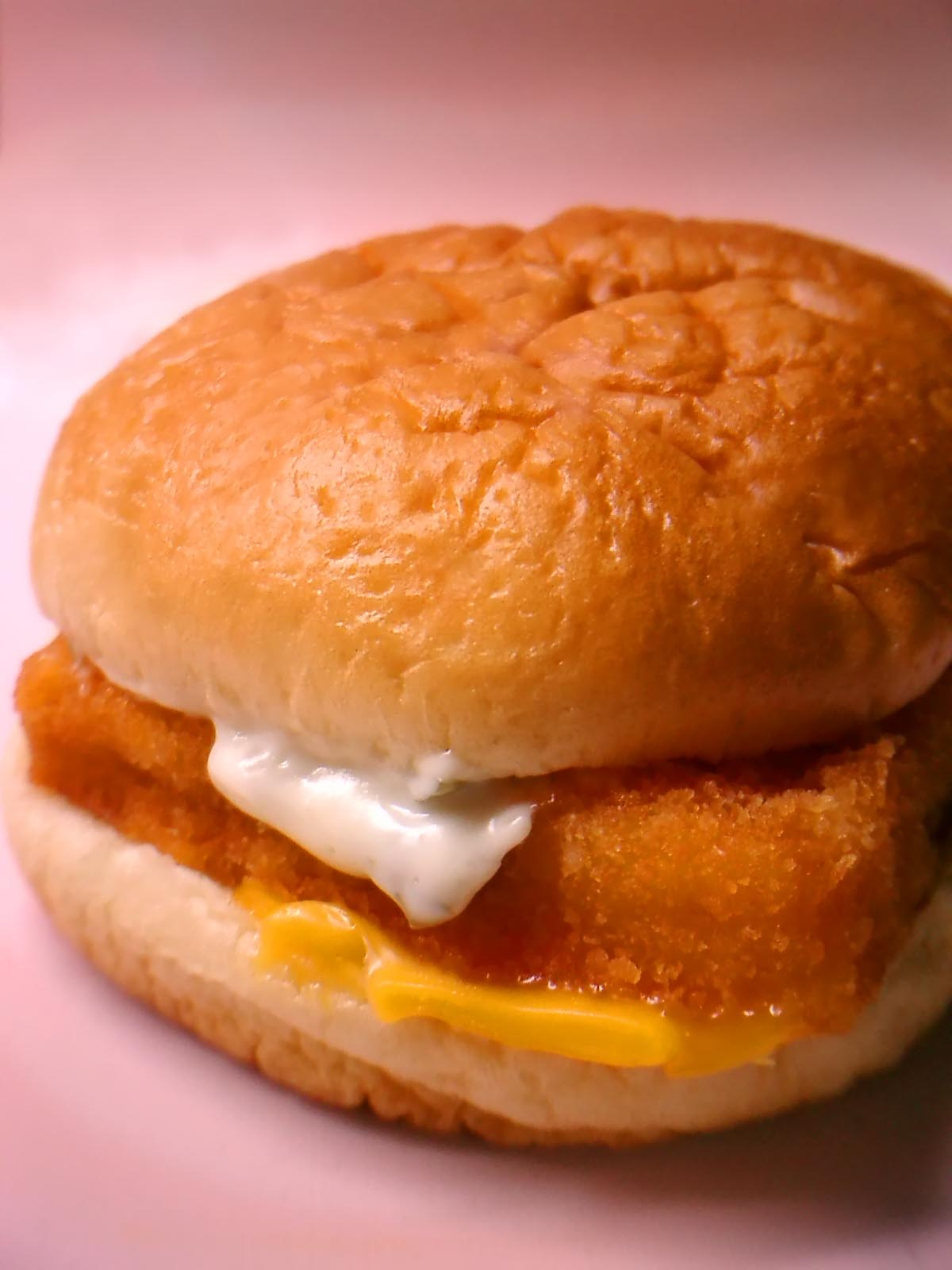 Filet-O-Fish